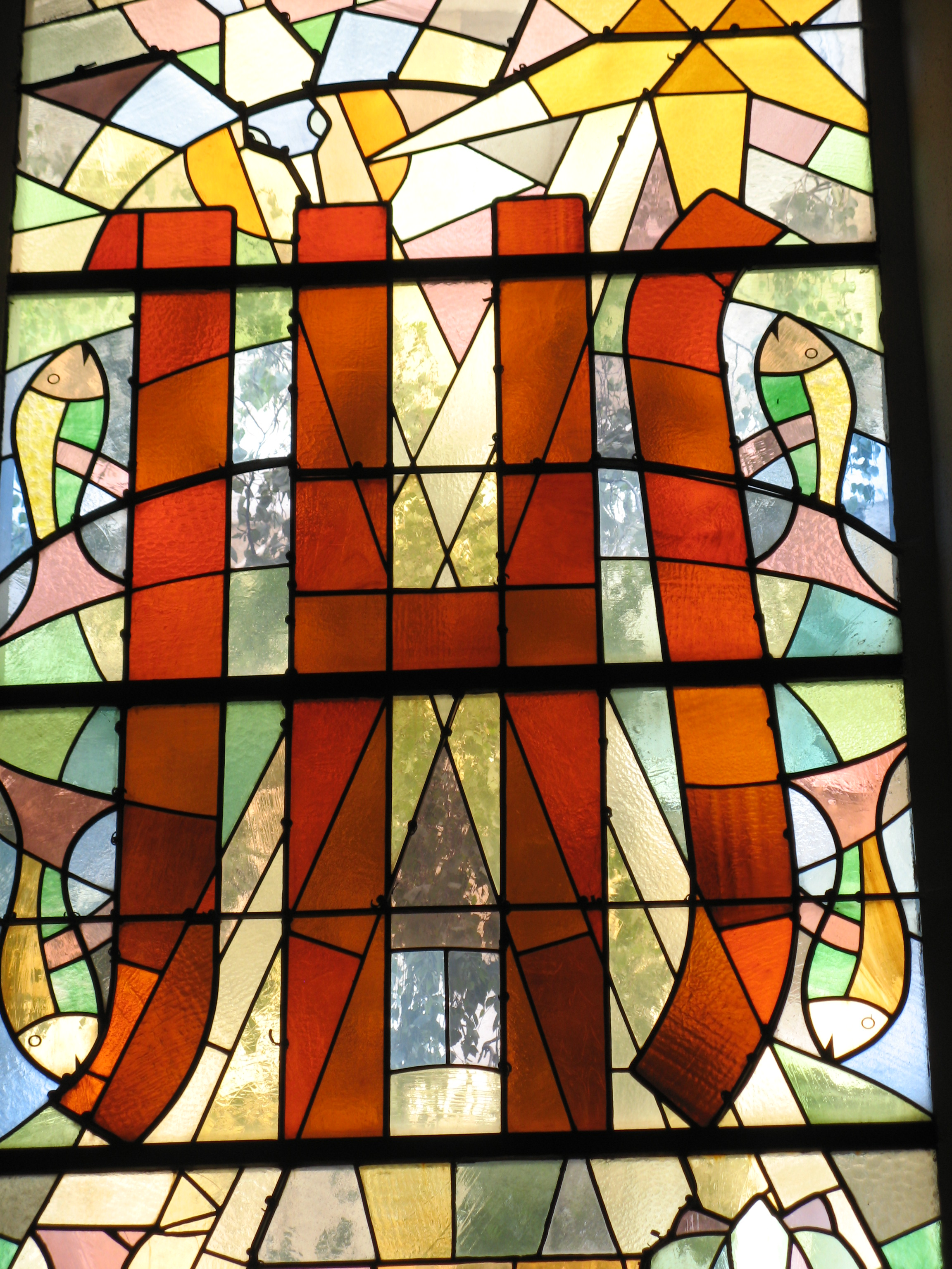 Glasfenster von Oswin Amann in der Kirche Namen Jesu, Wien-Meidling